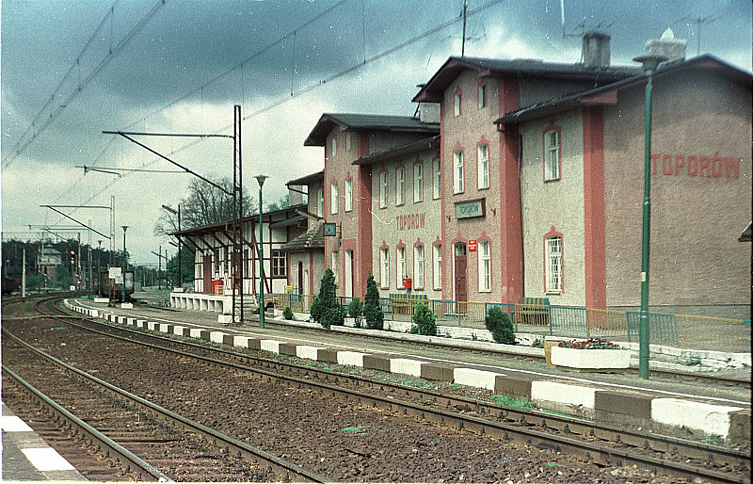 Dworzec w Toporowie 1991